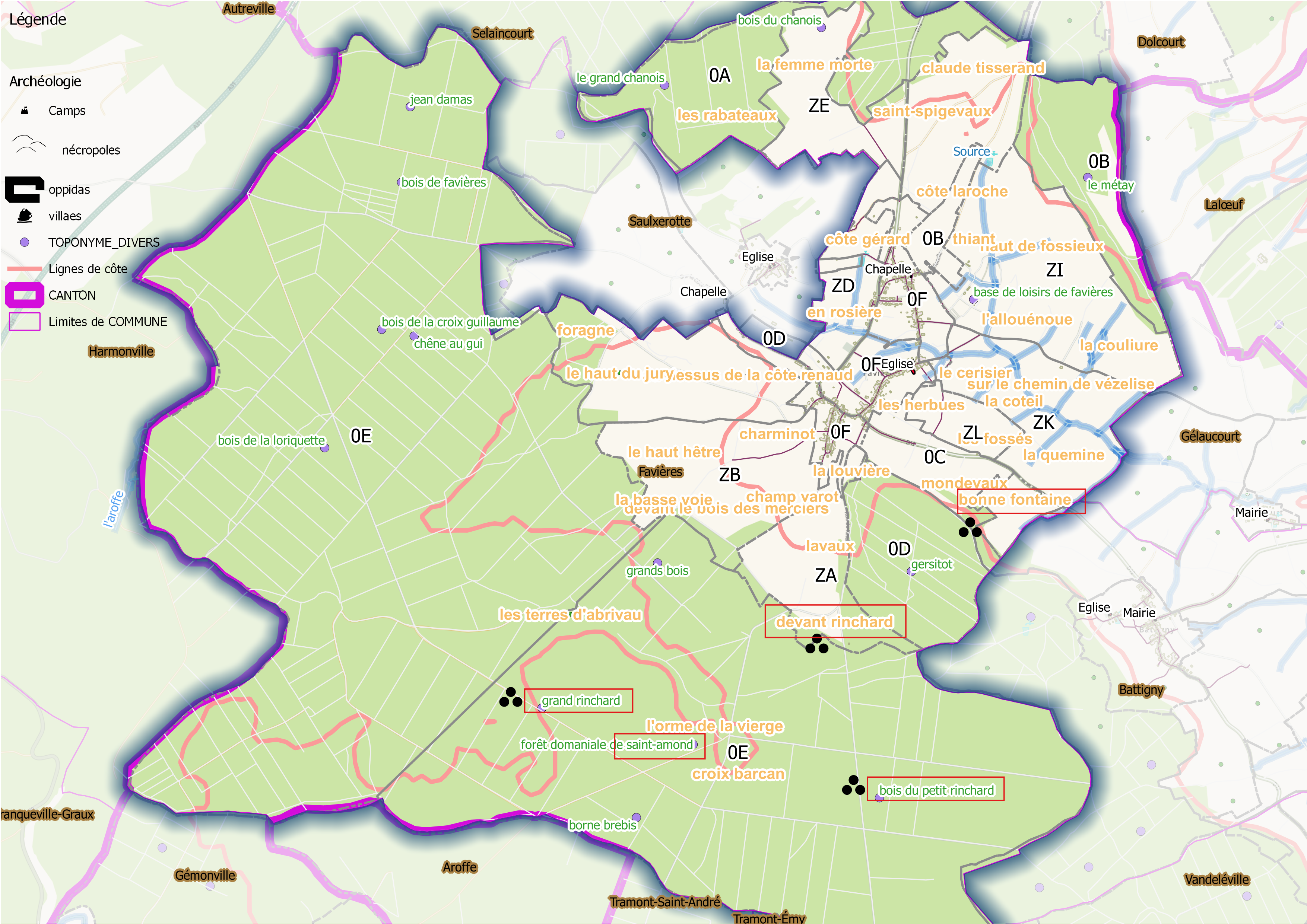 Favieres (ban communal) OSM et Qgis , mentions additionnelles